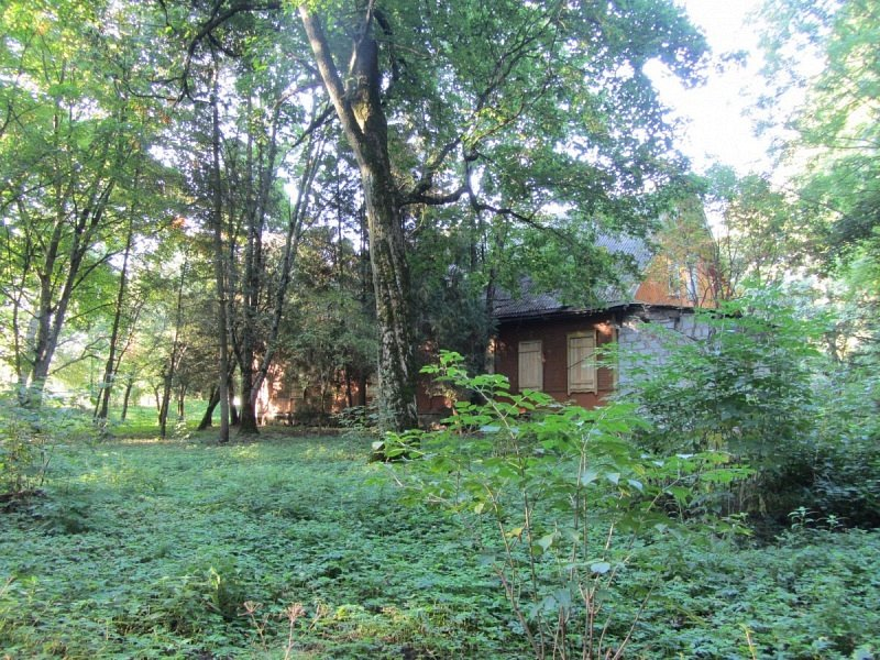 Парк Руткевічы